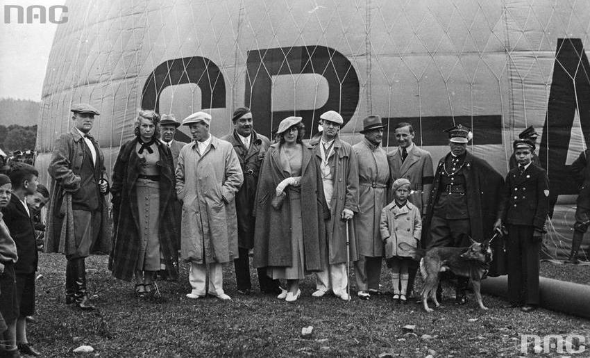 Grupa osób stojąca przed balonem Sanok. Widoczni m.in.: śpiewak Adam Didur (4. z prawej), śpiewaczka Olga Didur-Wiktorowa (6. z prawej), pierwszy prezes Sanockiego Klubu Balonowego, współwłaściciel i naczelny dyrektor Polskiej Spółki dla Przemysłu Gumowego S.A. Sanok doktor Oskar Schmidt z żoną.